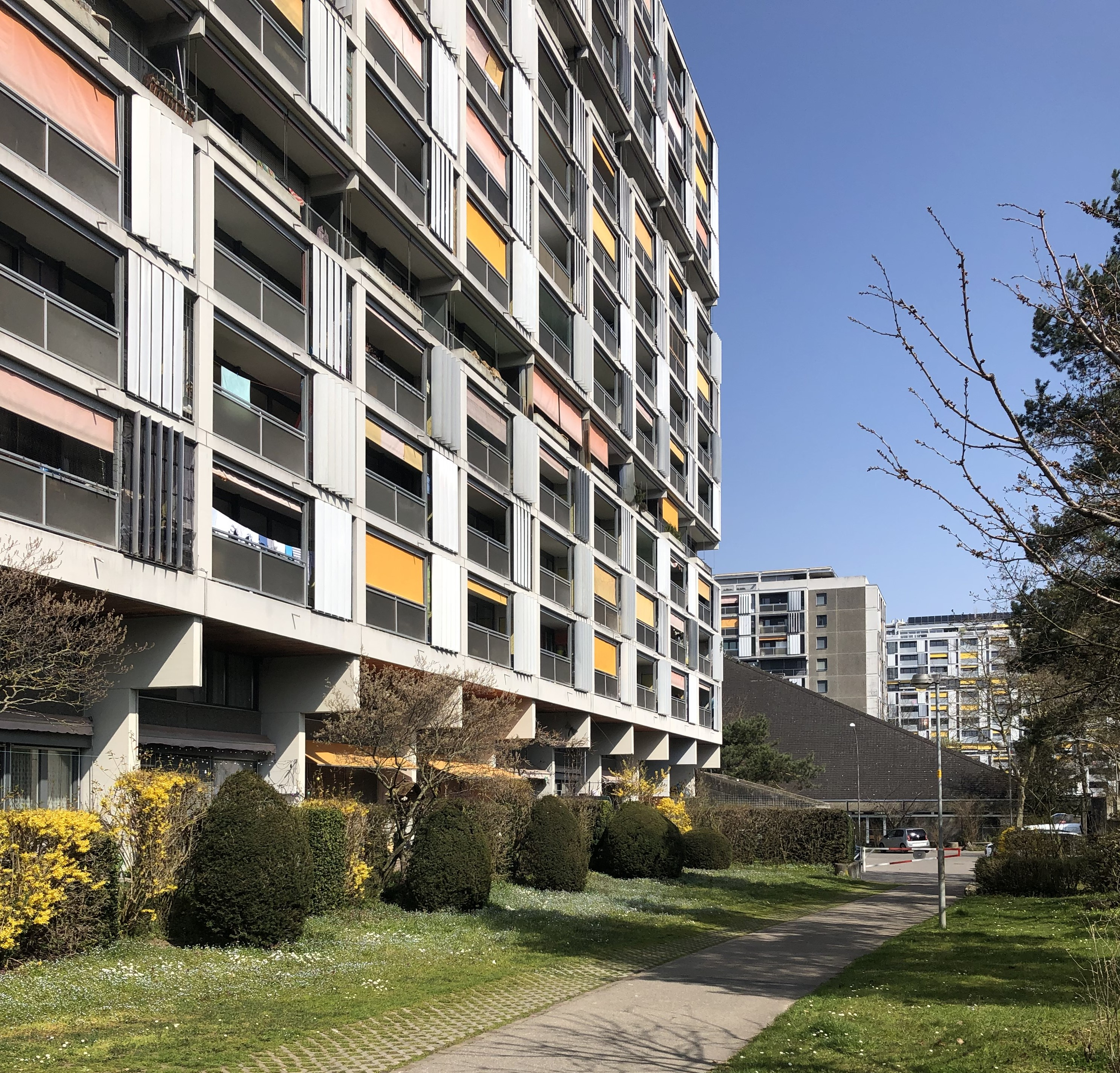 Gäbelbach: Hochhausblick an der Murtenstrasse